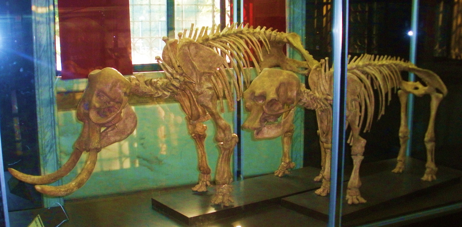 Fossil of Elephas falconeri, an extinct elephant- Took the photo at Museo di Storia Naturale di Milano